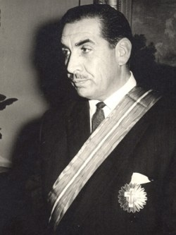 Juan de Dios Carmona Peralta en 1967.